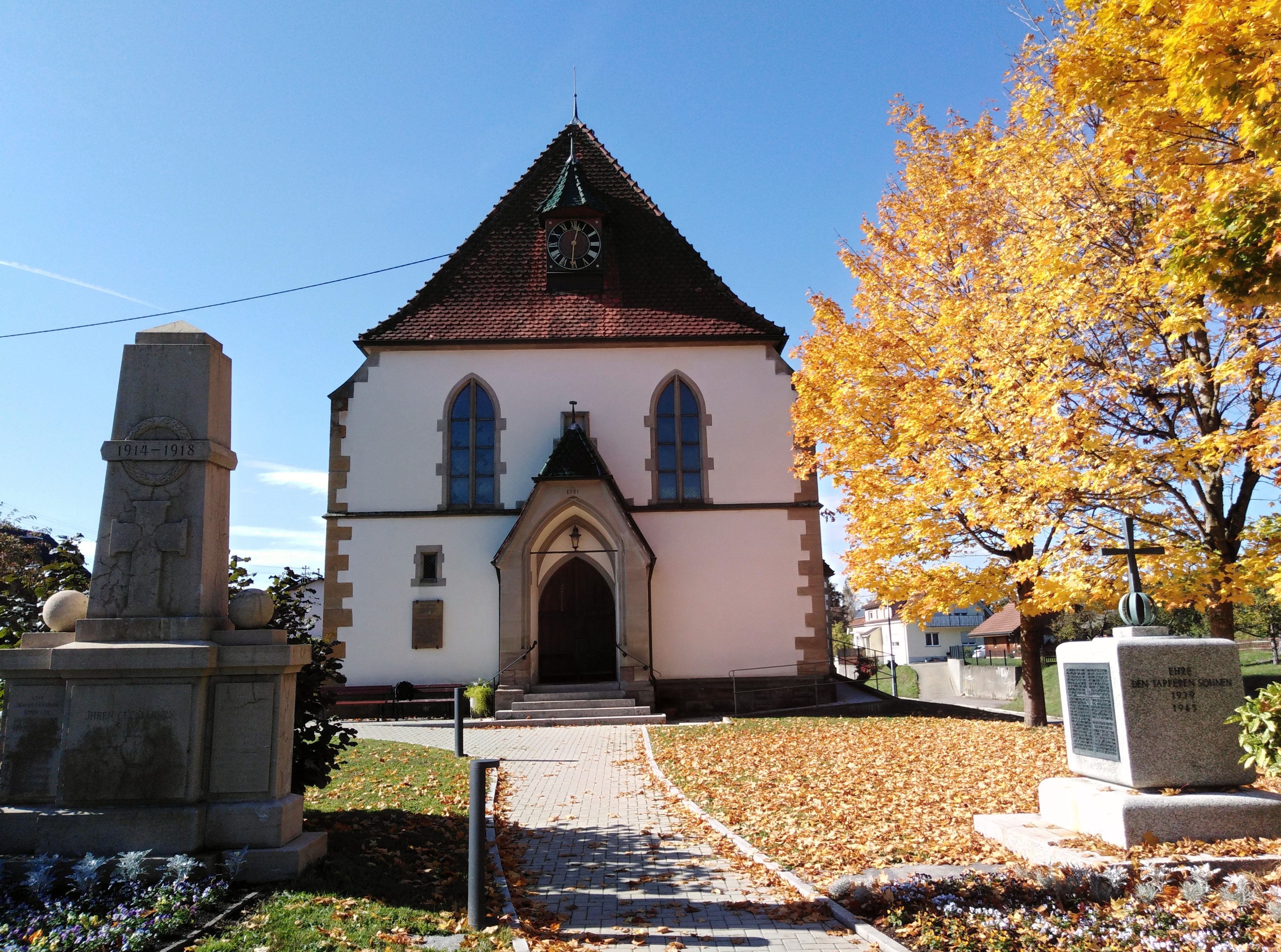 Ortschaft Dangstetten,Ortsteil der Gemeinde Küssaberg im Landkreis Waldshut in Baden-Württemberg. Kapelle der hl. Anna mit den Denkmalen der Gefallenen des Ersten (links) und Zweiten Weltkriegs.